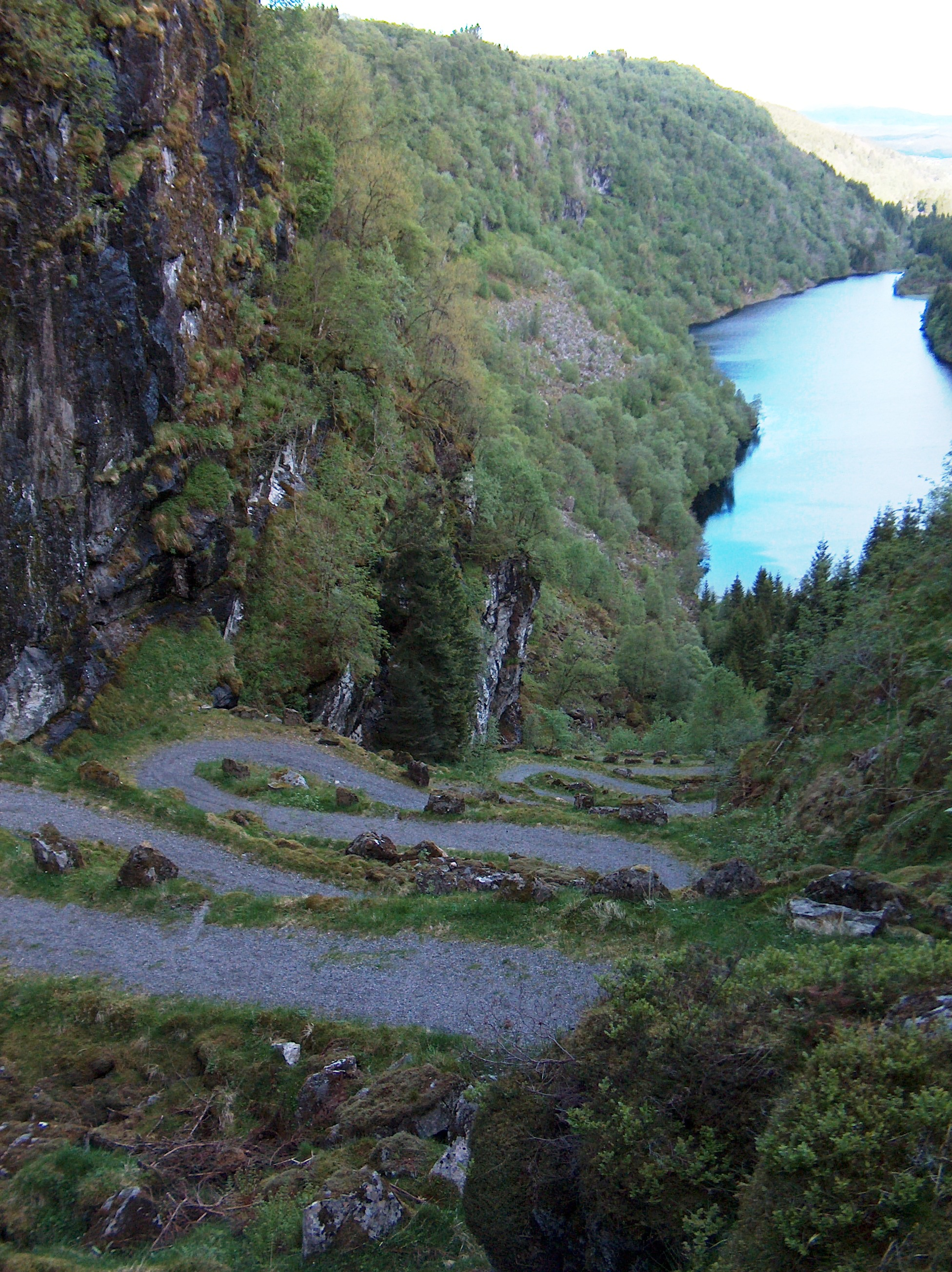 Kossdalssvingane